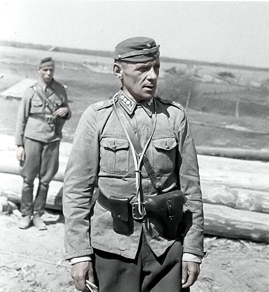 Jatkosodan 1. Jääkäriprikaatin komentaja Ruben Lagus.